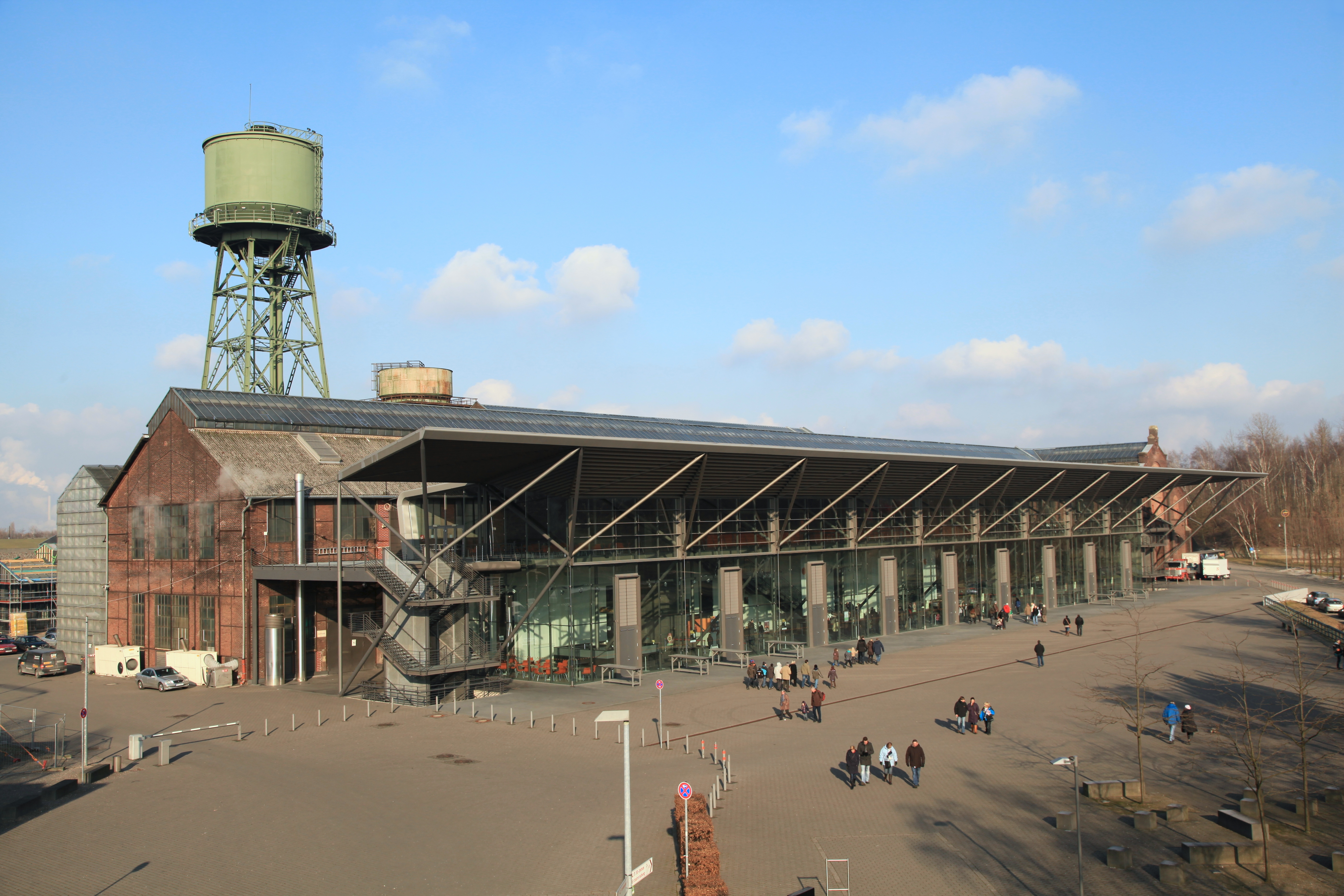 Jahrhunderthalle im Westpark, Bochum